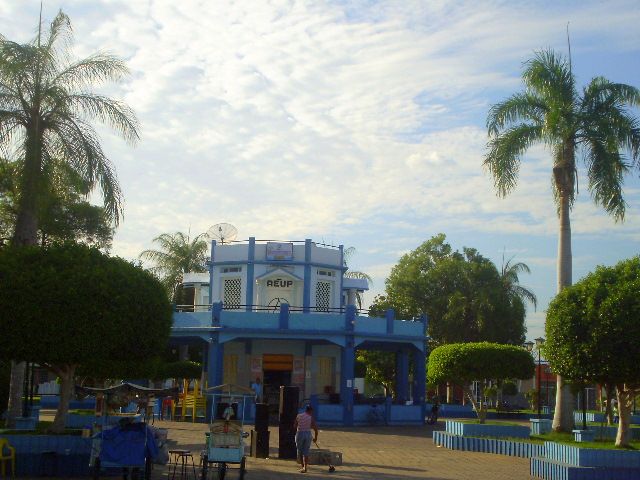 Bar Centenário, e no segundo andar AEUP (Associação dos Universitários de Pombal) Na praça Centenária, centro de Pombal.